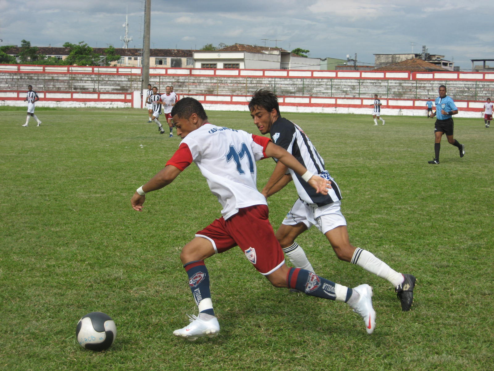 Partida realizada a 30 de novembro de 2009 entre Castelo Branco 0 x 0 Rio das Ostras para a decisão do terceiro lugar da Série C, vencida nos penâltis pelo Rio das Ostras por 8 a 7.